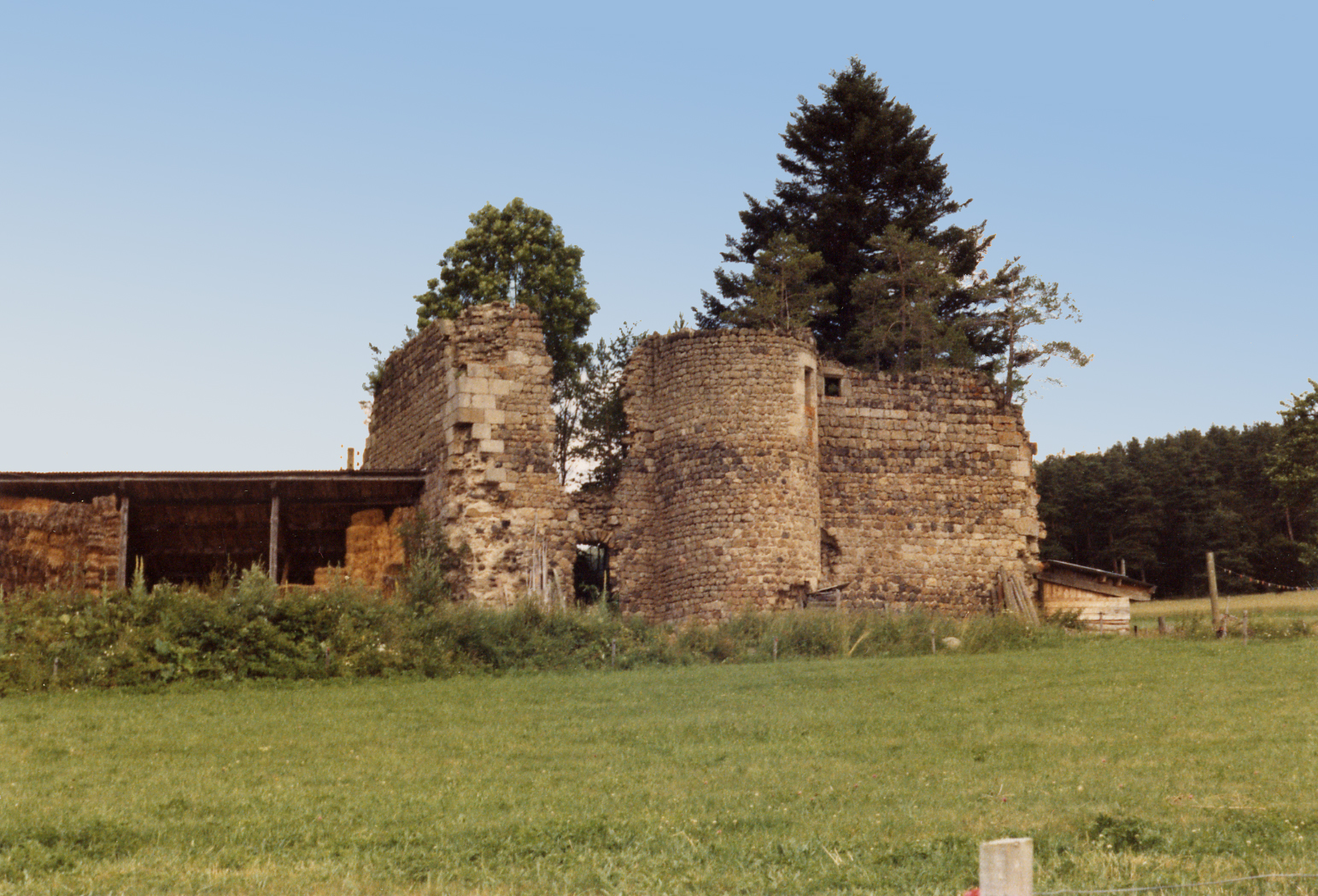 Tour de l'ancien château de Bostfranchet